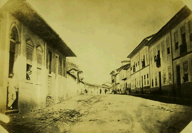 Rua Frorencio de Abreu, São Paulo